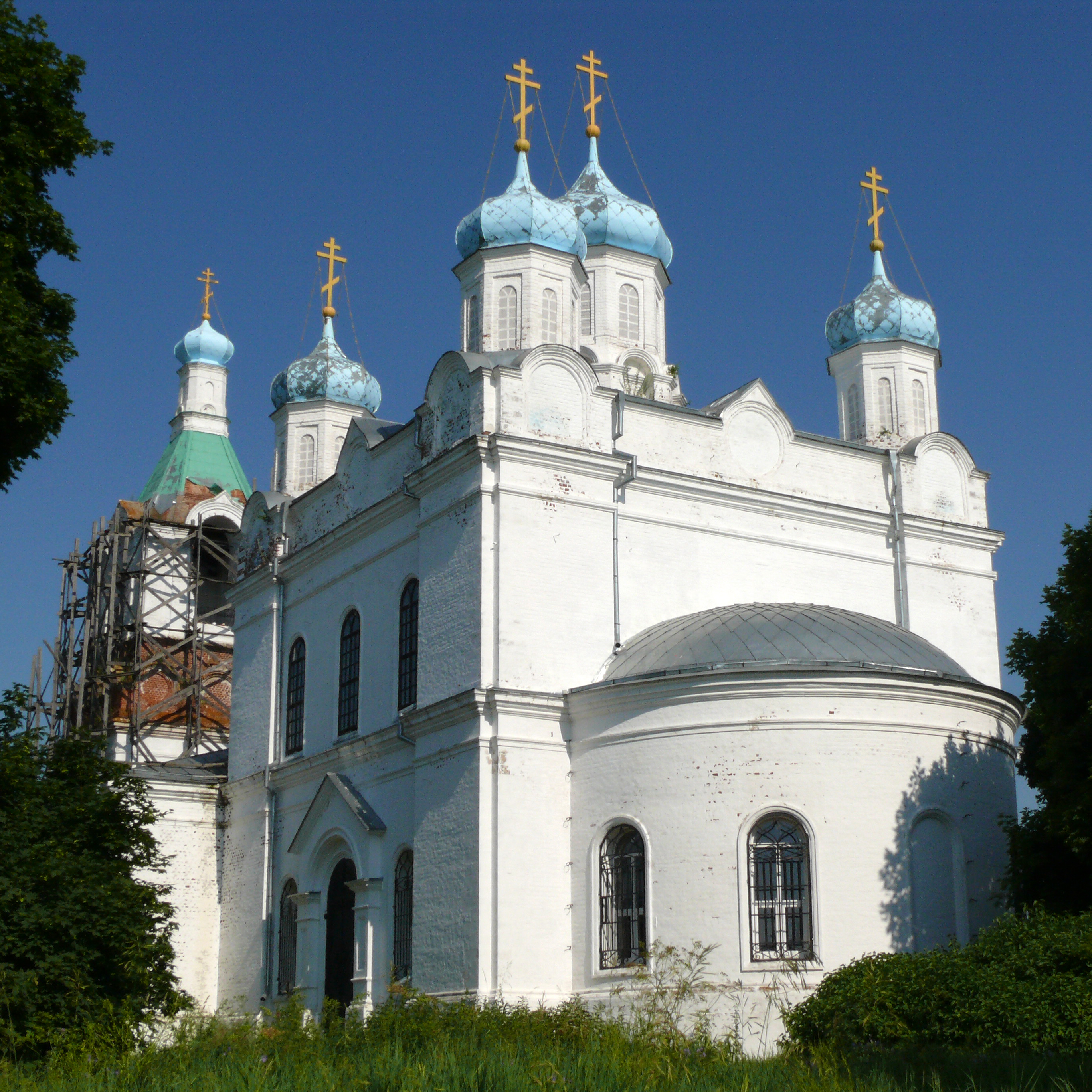 Никольская церковь: Печерниковские выселки, Михайловский район, Рязанская область